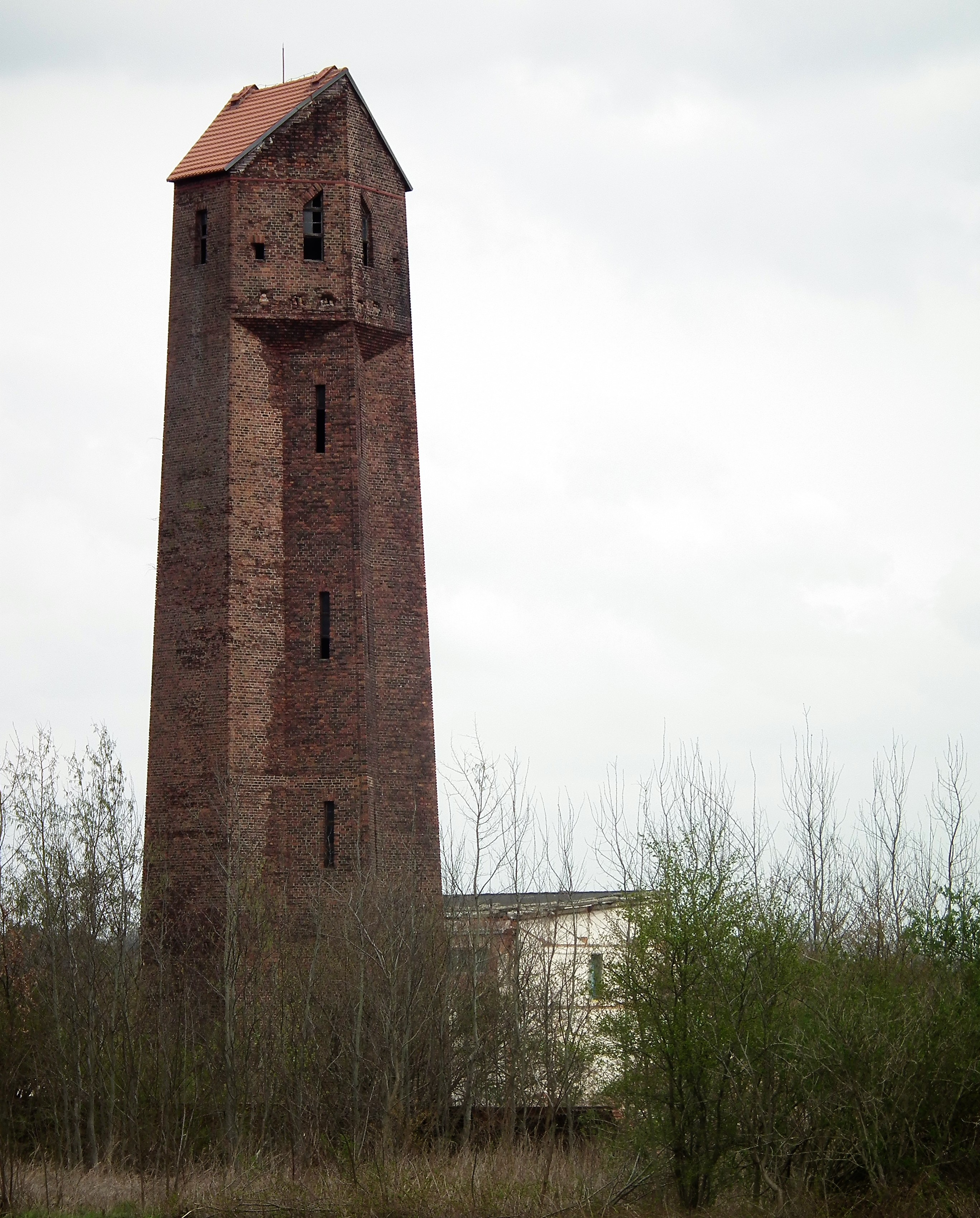 Wieża wodna w Jankowej Żagańskiej.